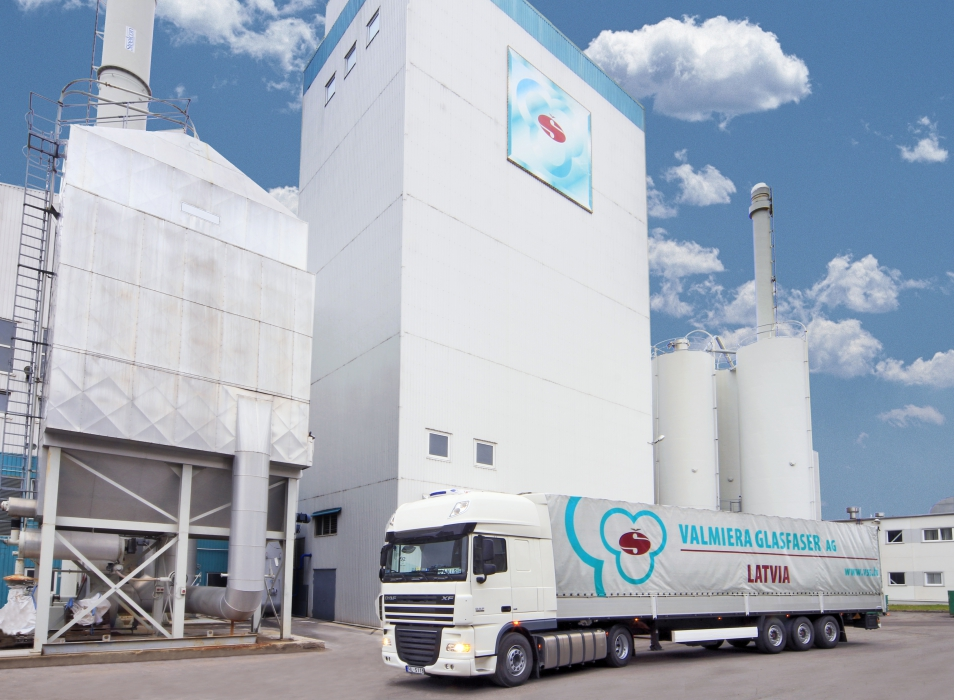 Factory Valmieras stikla šķiedra